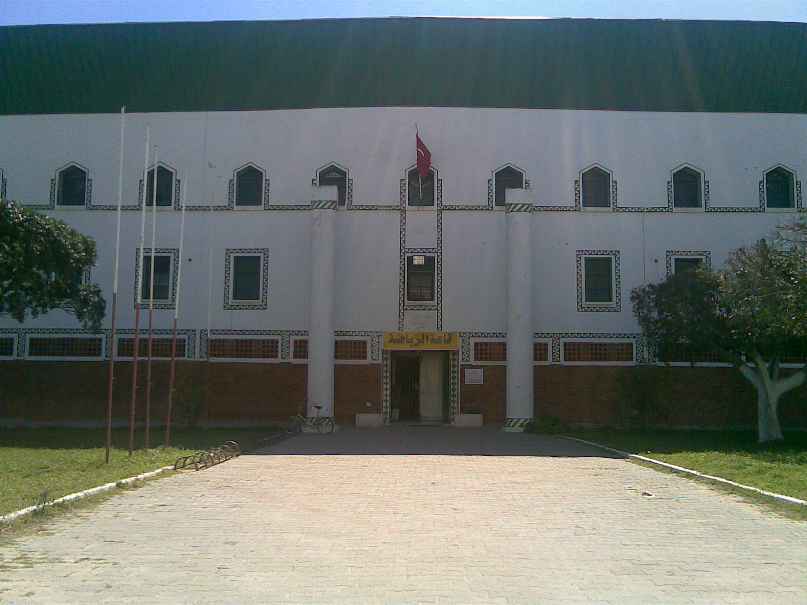 Salle de sports de Beni Khiar